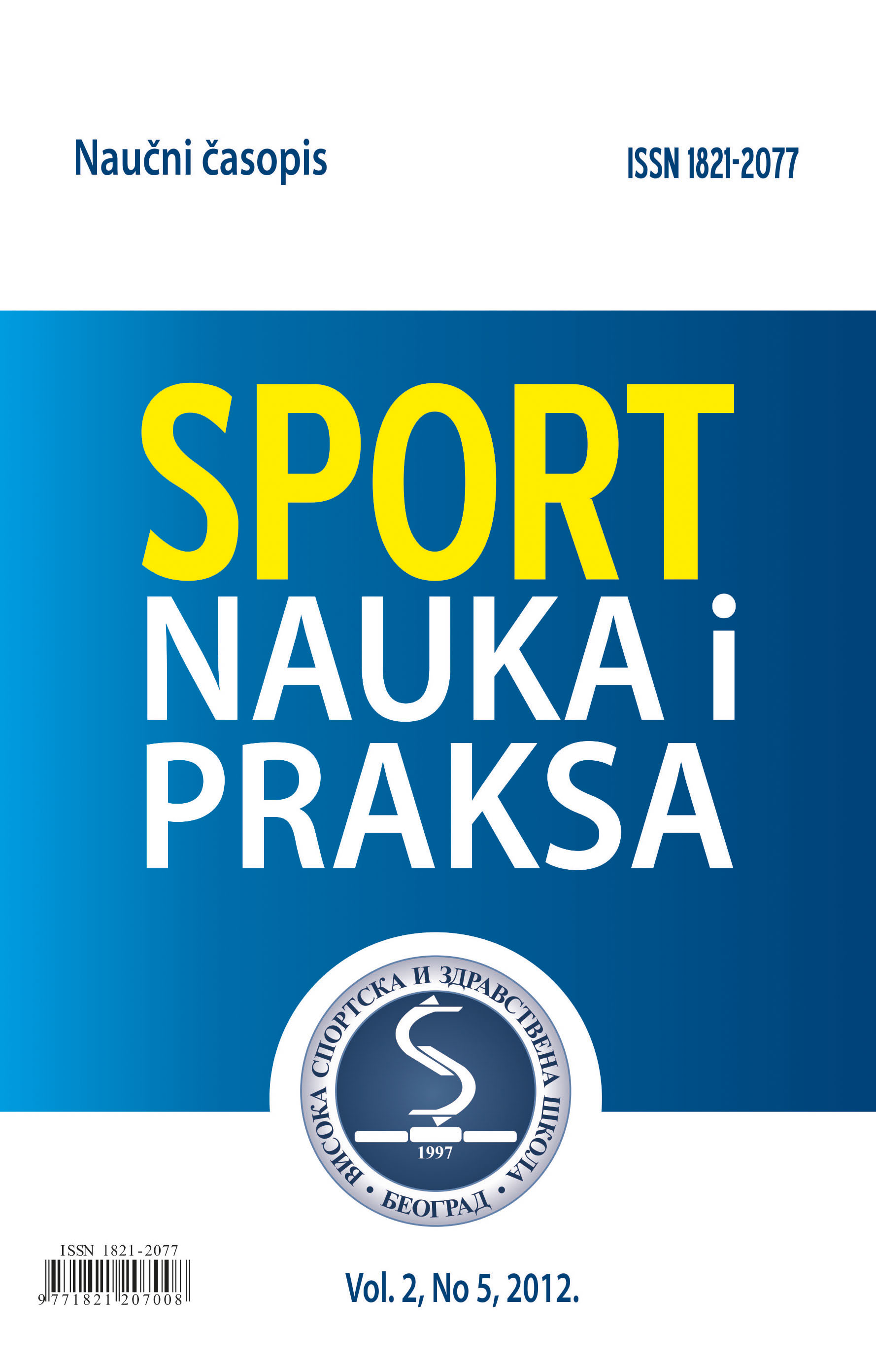 Korica časopisa „Sport – nauka i praksa“